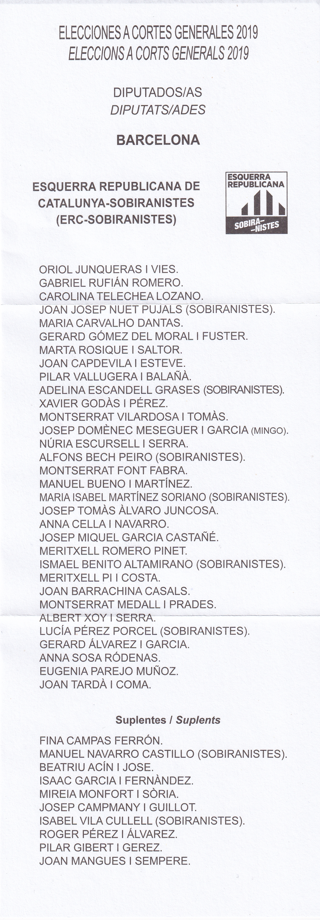 Papeleta electoral de Esquerra Republicana de Catalunya-Sobiranistes (ERC-SOBIRANISTES) para el Congreso - Elecciones Generales de España de 2019, circunscripción de Barcelona.